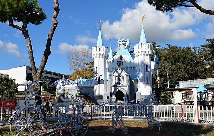 Il castello di Lord Sheldon